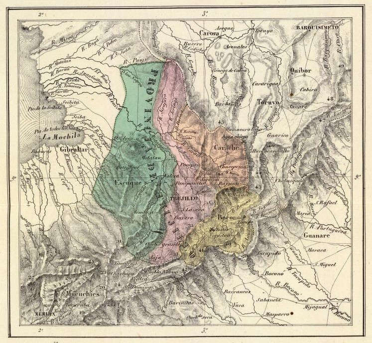 Provincia de Trujillo. Tomado del "Atlas físico y político de la República de Venezuela", 1840.